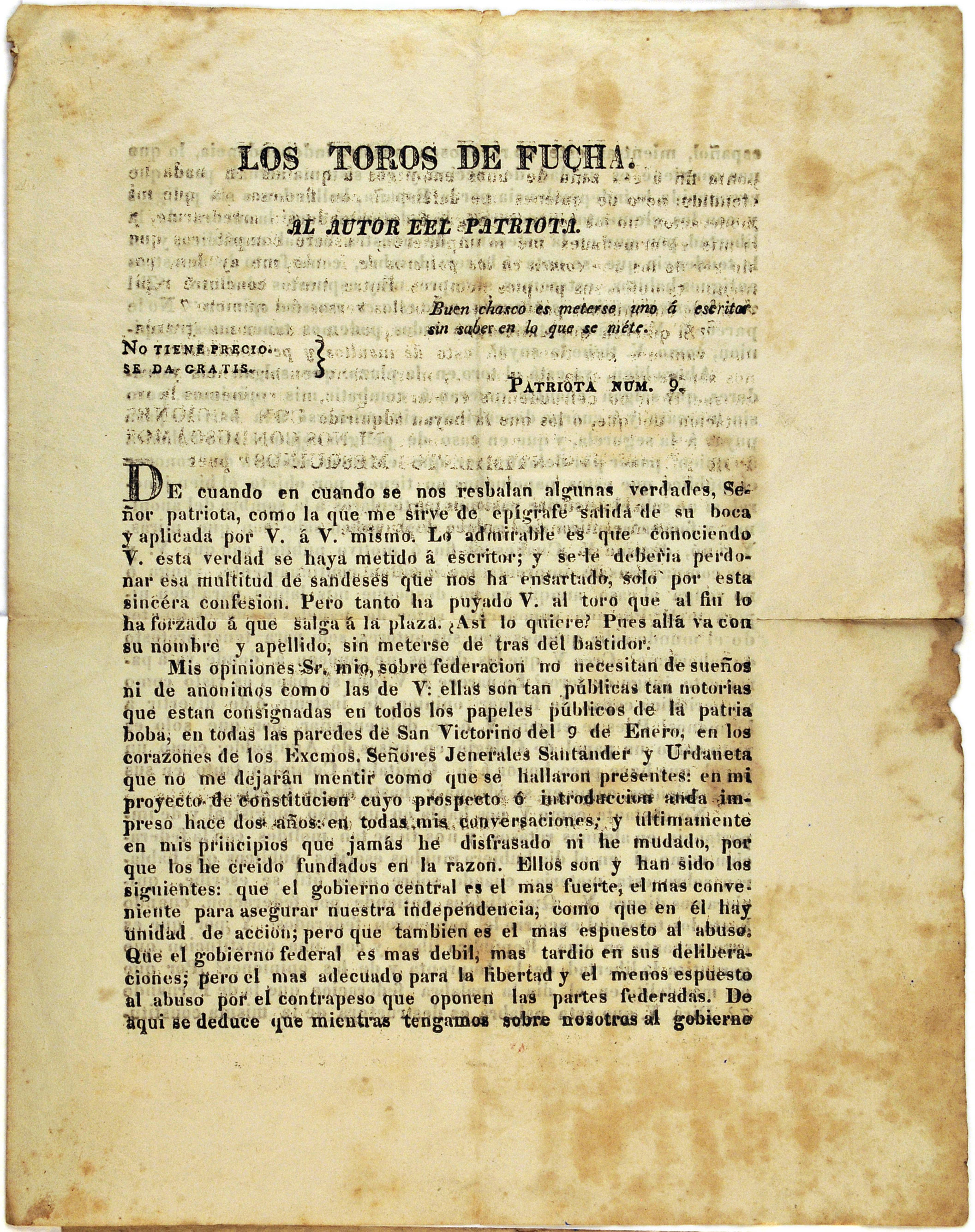 Première page du numéro de "Los Toros de Fucha" paru le 5 mars 1823.